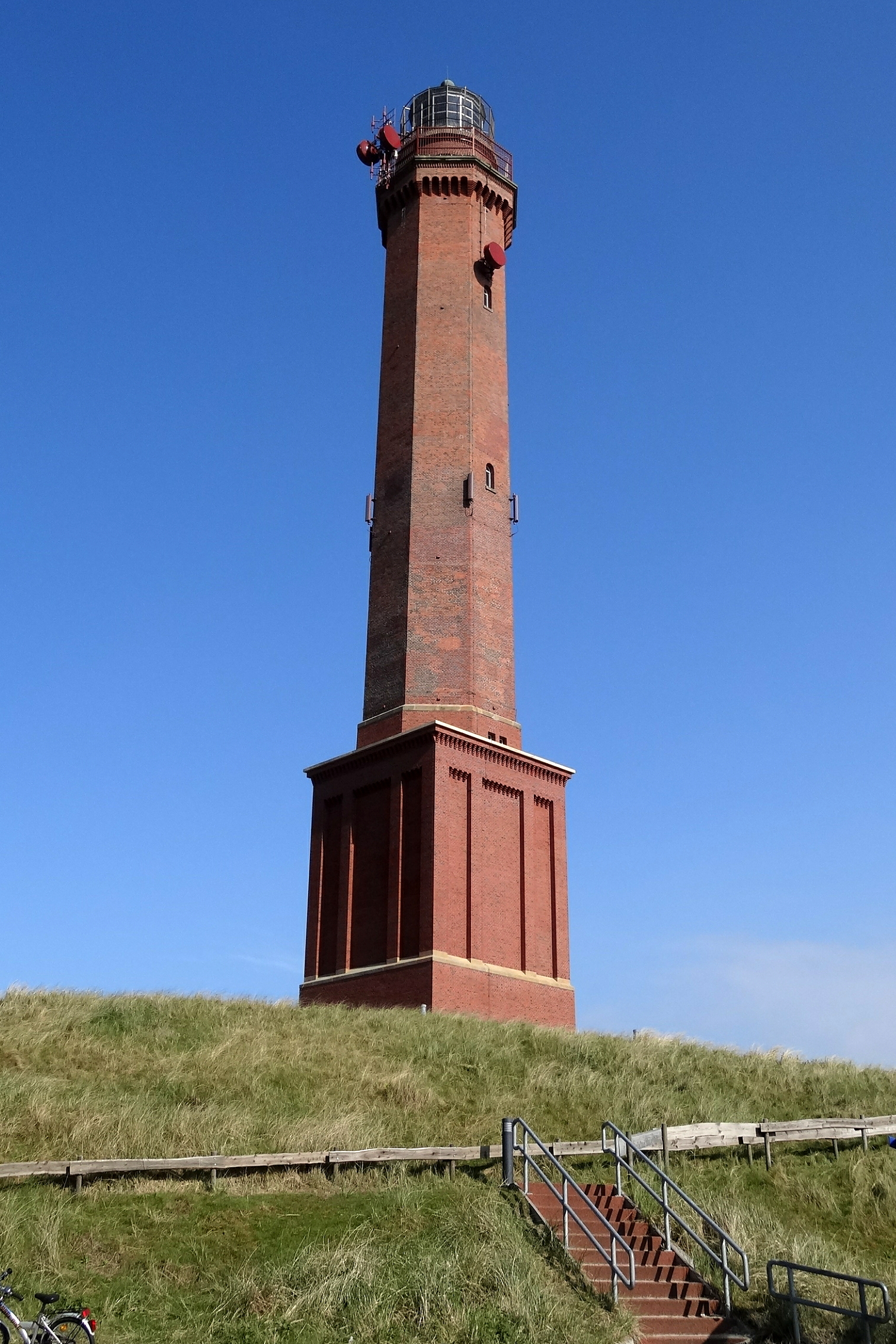 Nationalpark Niedersächsisches Wattenmeer - Norderney